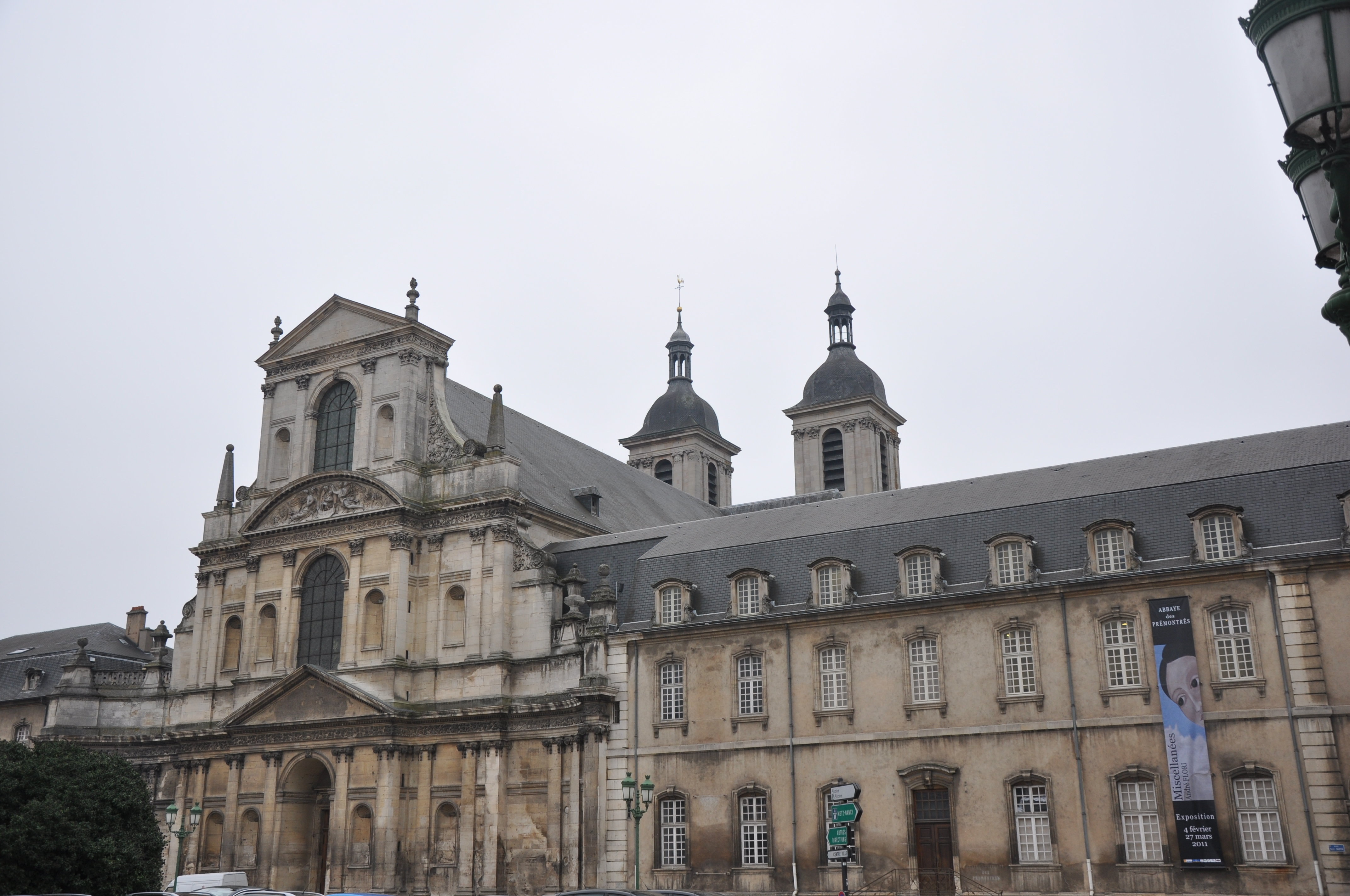 Abbaye des Prémontrés de Pont-à-Mousson; 9 Rue Saint-Martin, Pont-à-Mousson, Lorraine, France